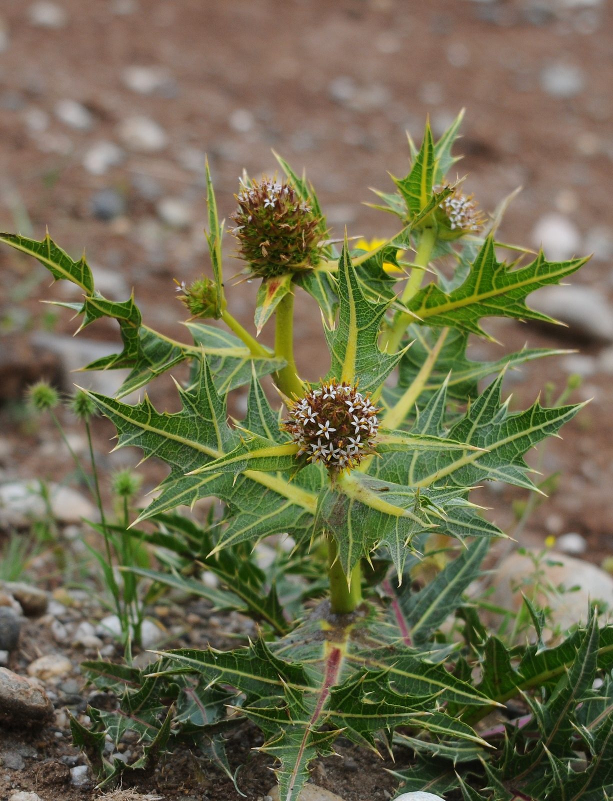 Kurdî: Kereng